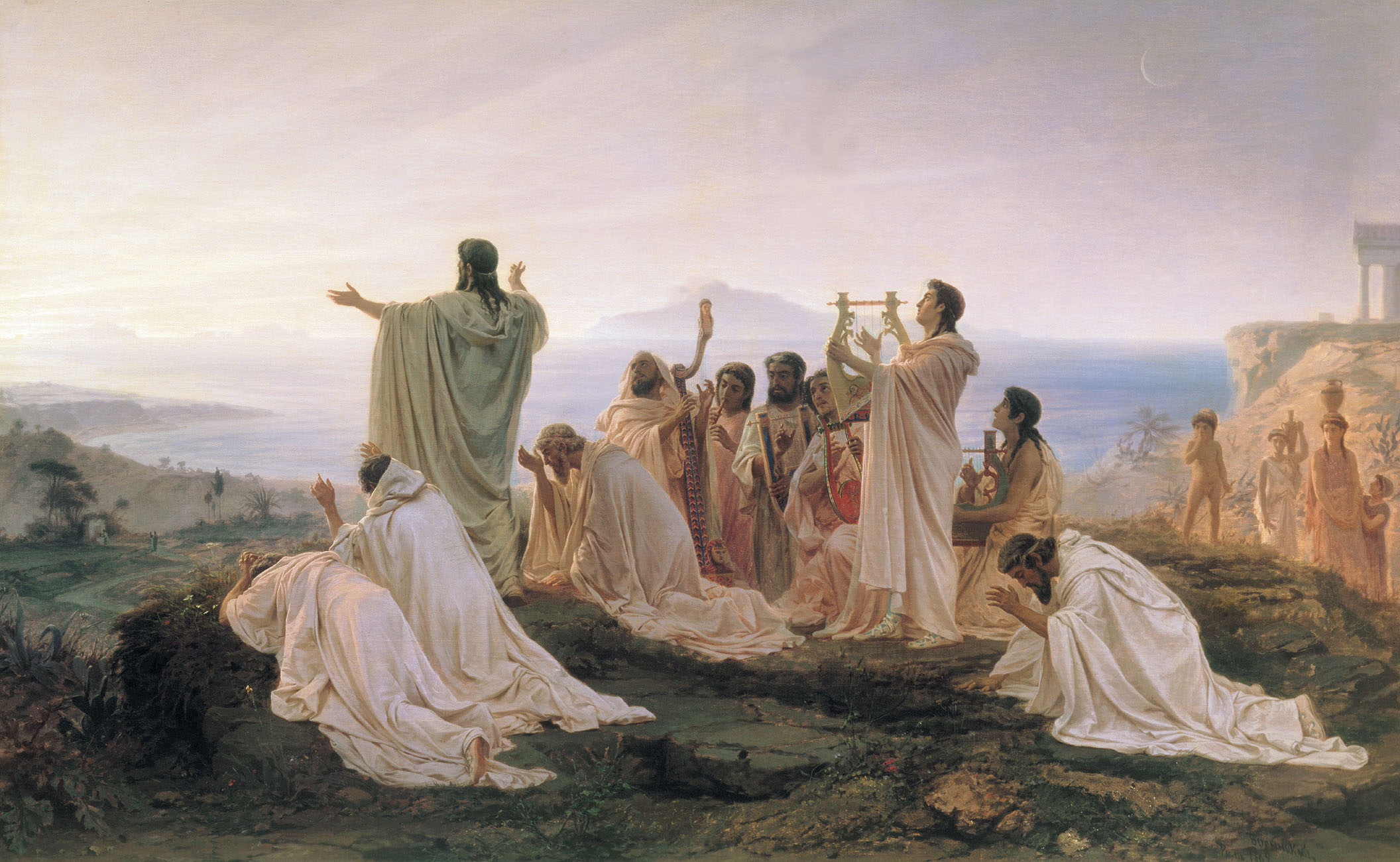 Pythagoreans celebrate sunrise